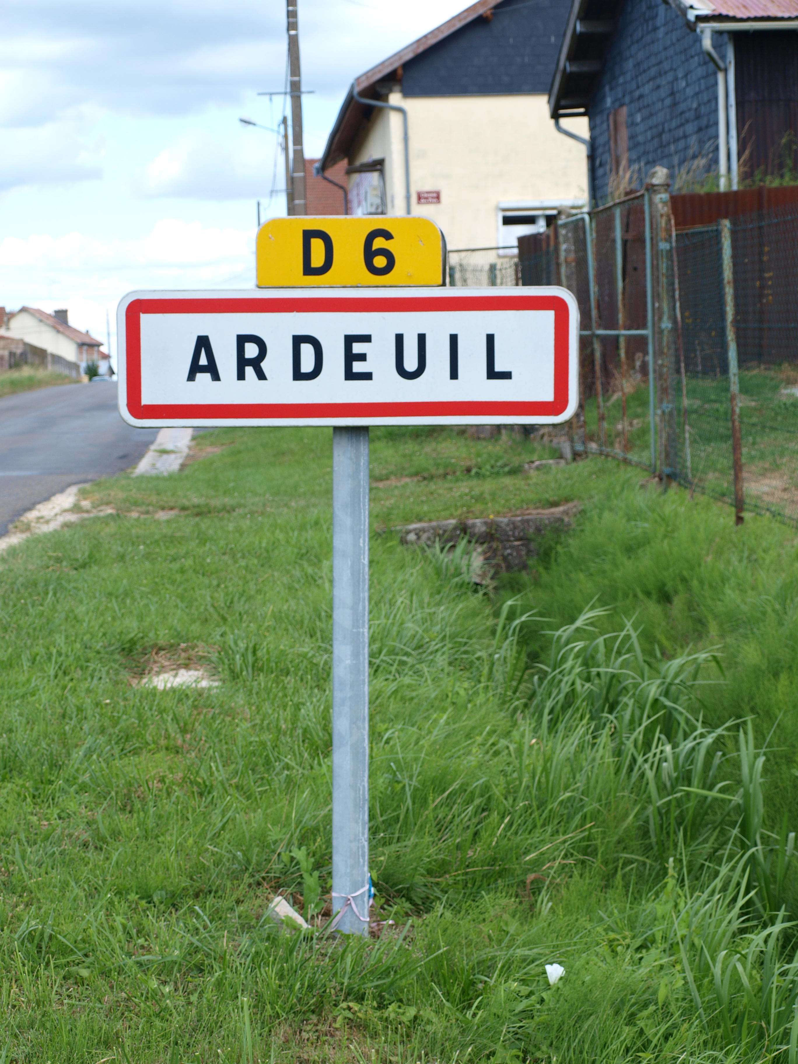 Ardeuil-et-Montfauxelles (Ardennes, France) ; panneau d'agglomération de Ardeuil.